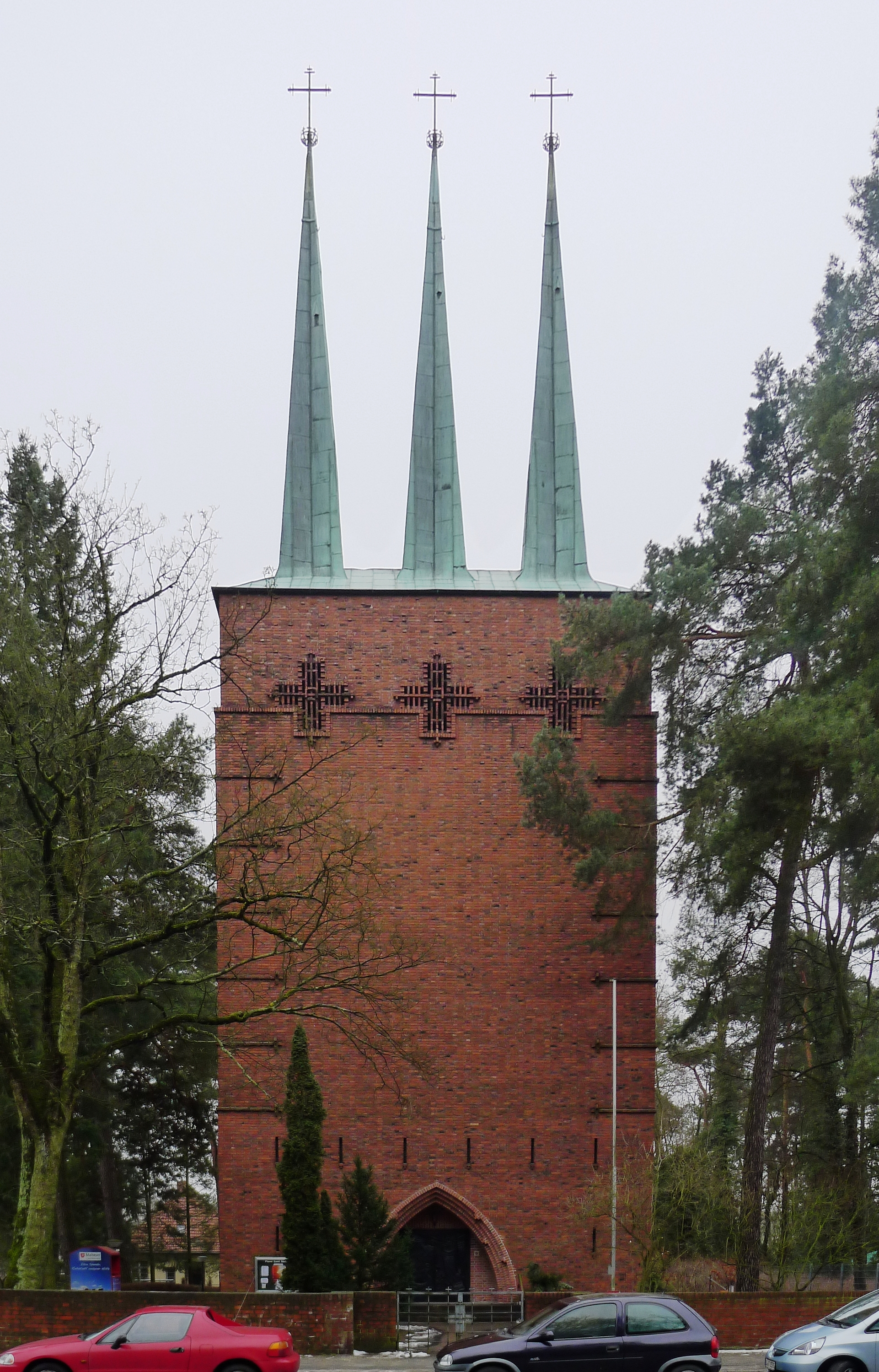 Fassade des Westwerks der Kirche